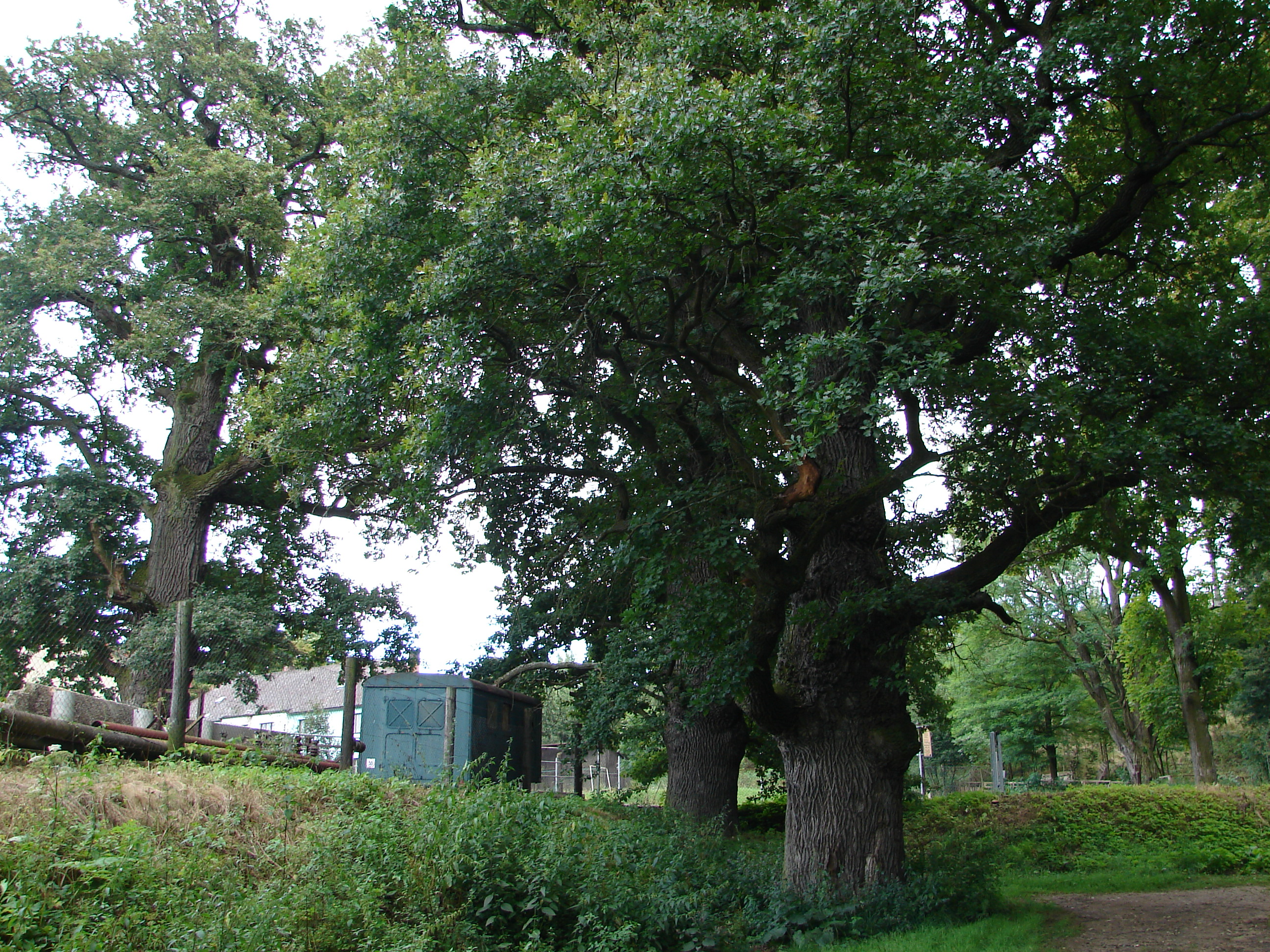 Památné stromy Zahrádecké duby, okres Jindřichův Hradec, Česká republika.